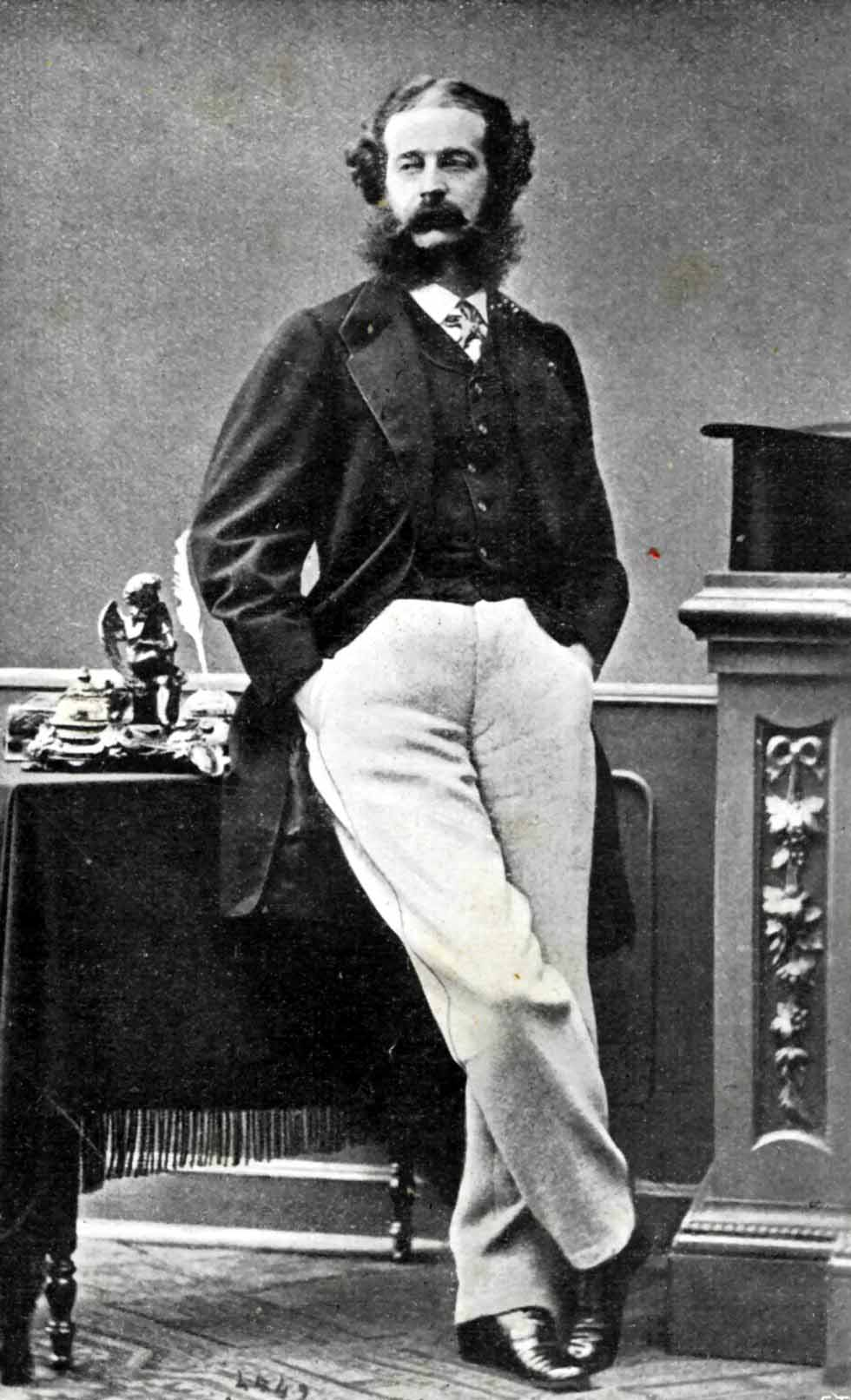 Emilio Visconti Venosta (marquis), an Italian diplomat